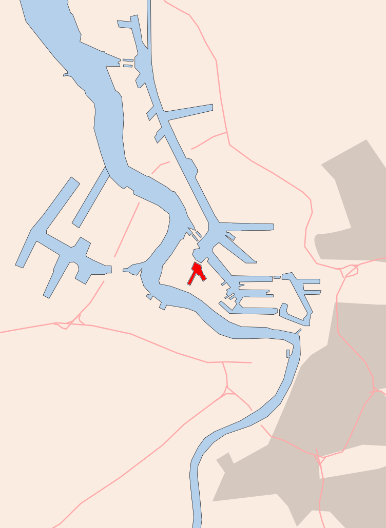 Antwerp , Marshalldok